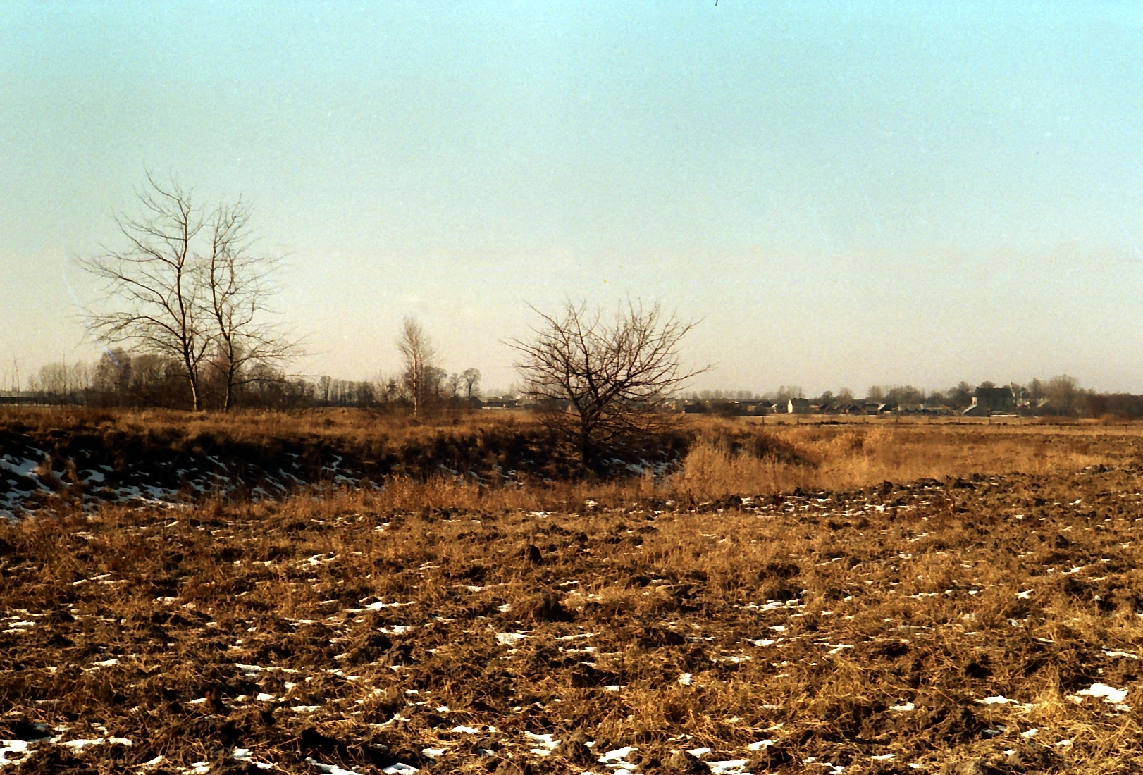 Zewnętrzne wały grodziska w roku 1993 (przed zniszczeniem).